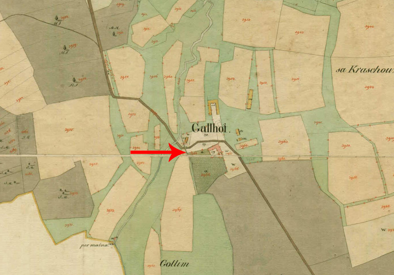 Franciscejski kataster za Kranjsko, 1823-1869